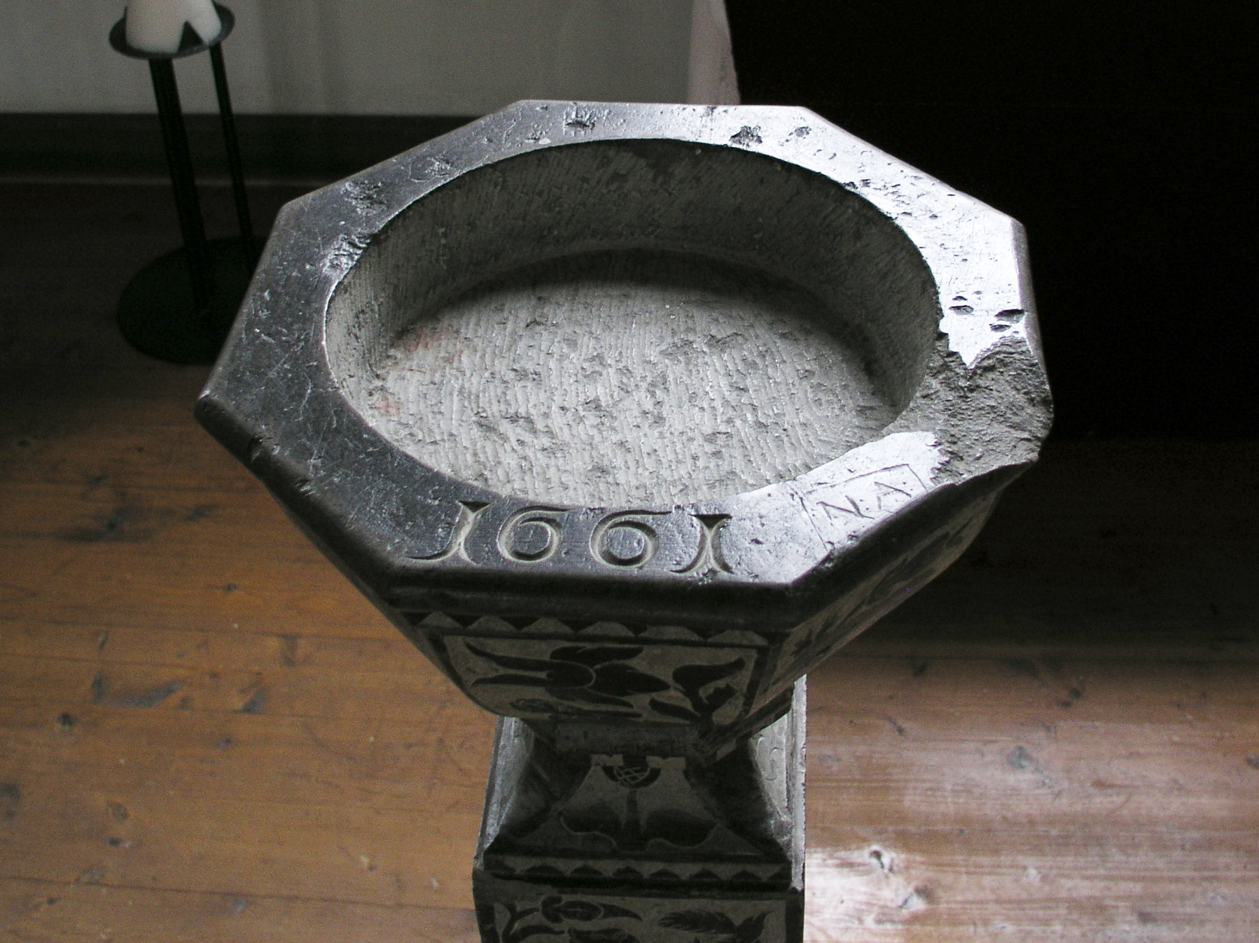 Röks kyrka, baptismal font